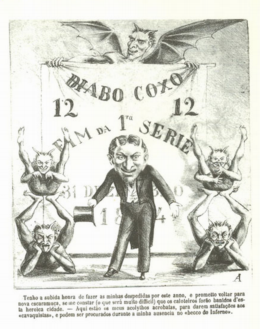 Frontispício do jornal Diabo Coxo, de dezembro de 1864; a publicação foi pioneira no gênero em S. Paulo, Brasil, e foi fundada por Angelo Agostini com Luiz Gama.